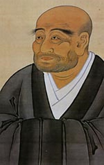 Portrait du peintre japonais Kanō Sanraku.